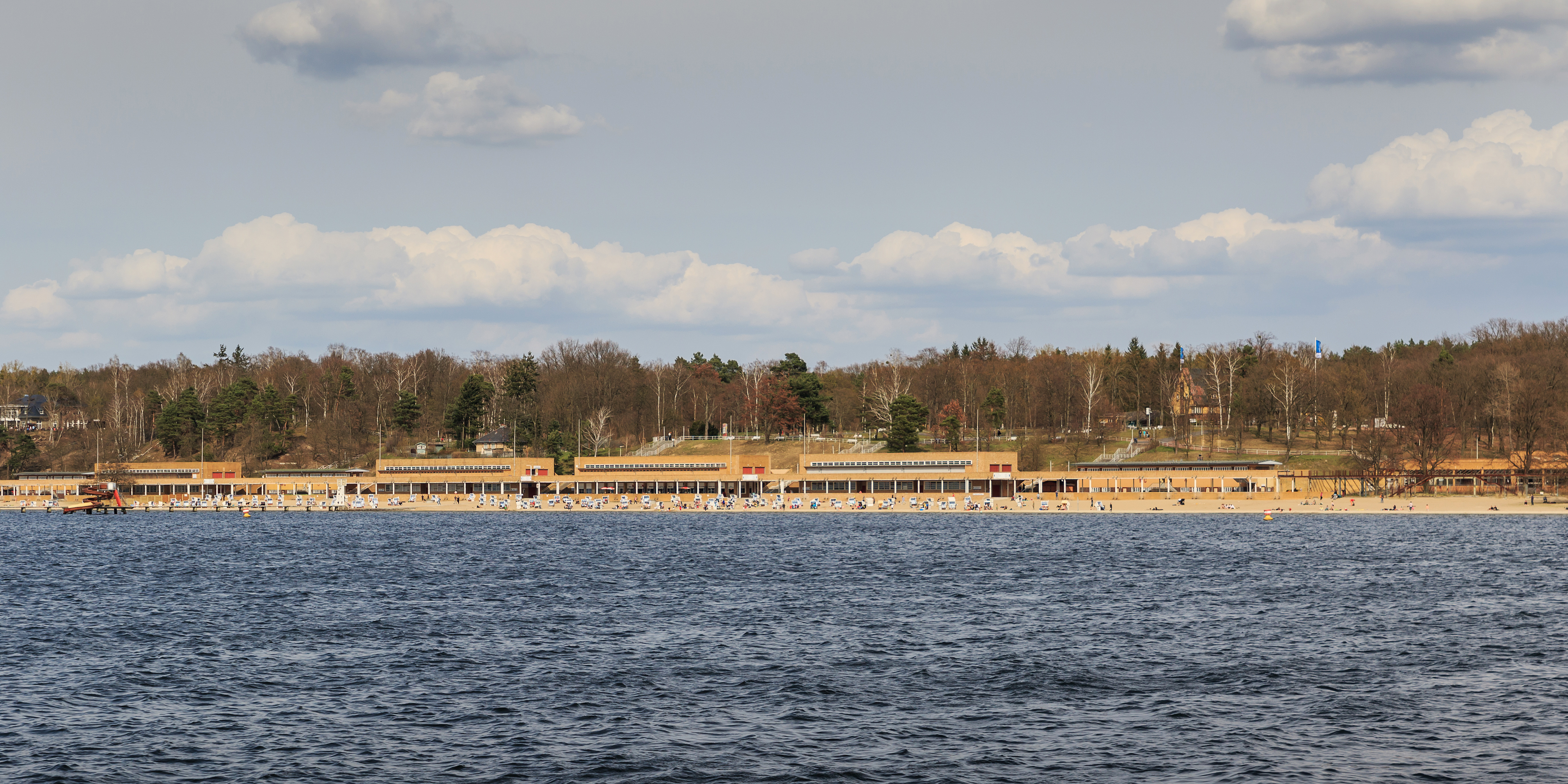 Aussicht von der Havelfähre aufs Strandbad Wannsee in Berlin